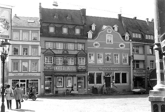 Wittlich Fotograf: Alexander Buschorn (1980) Lizenz: GNU-FDL